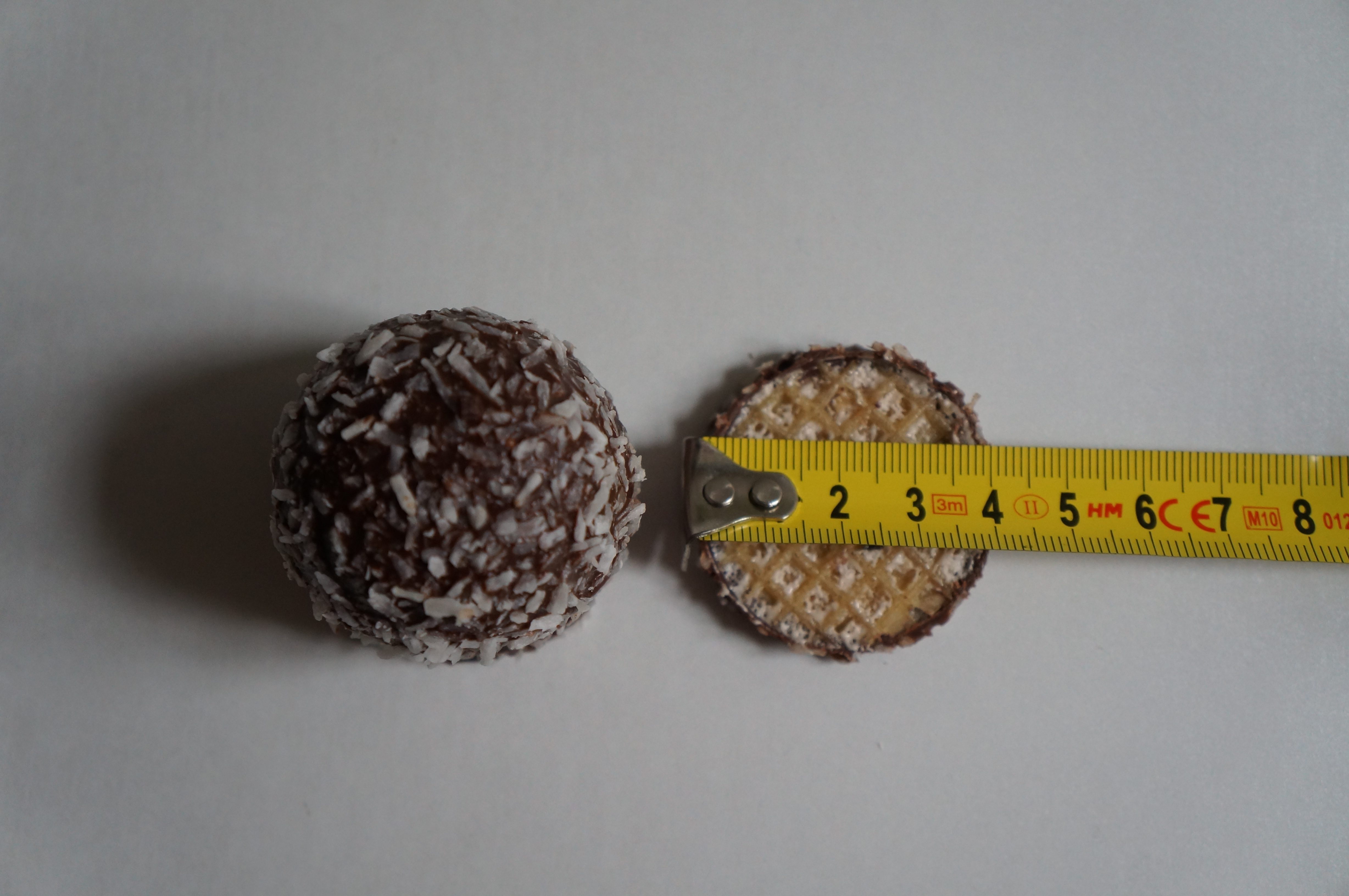 Durchmesser einer Schwedenbombe